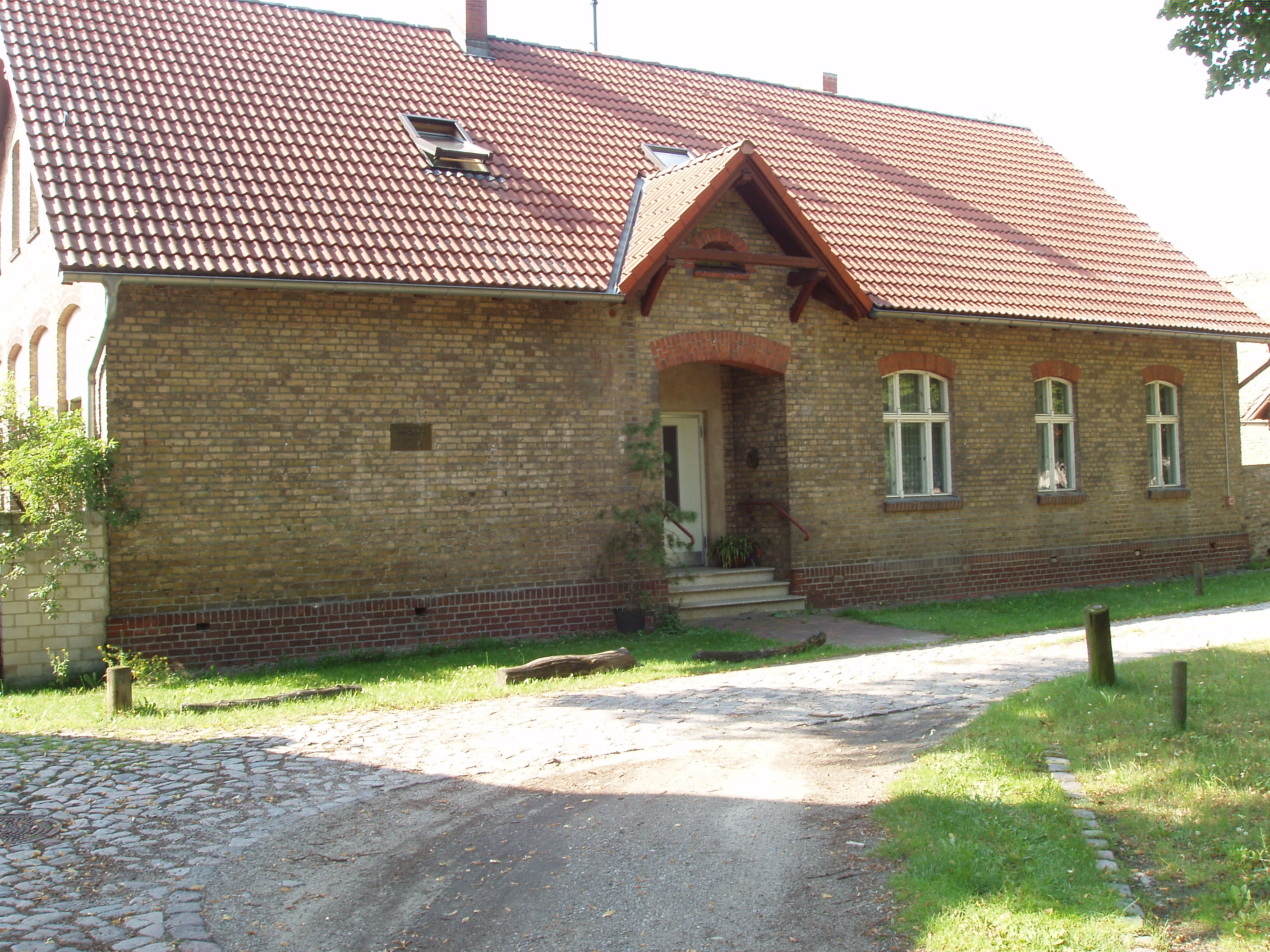 Das Schulgebäude mit Lehrerwohnung steht unter Denkmalschutz